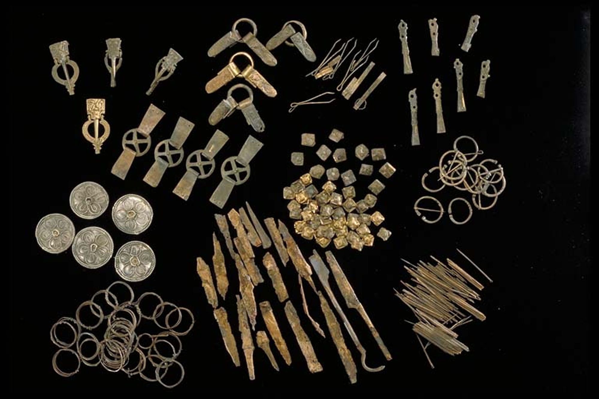 Furenfyndet. Statens historiska museum, inventarienummer 3947.